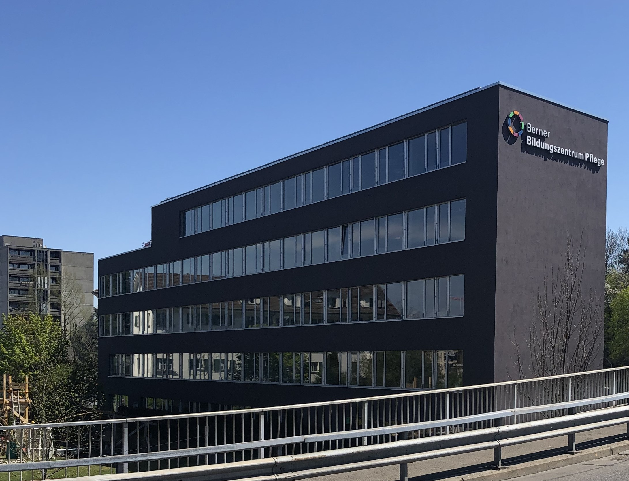 Berner Bildungszentrum Pflege